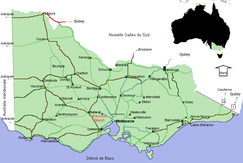 Bacchus Marsh sur la carte du Victoria